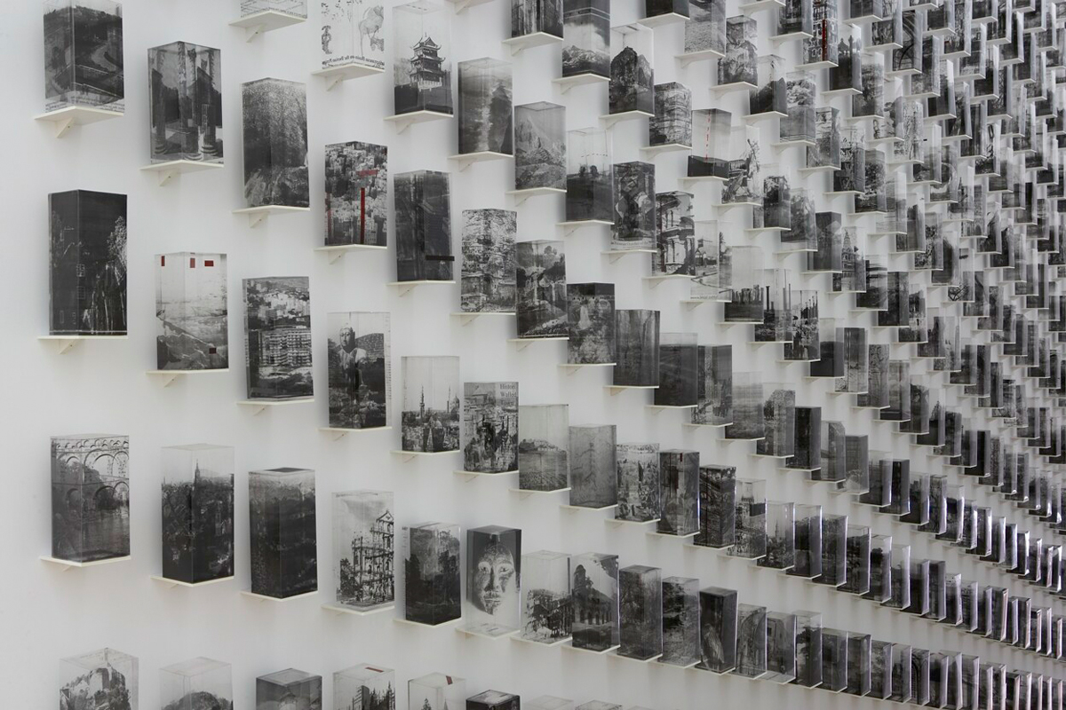 Pieces, 878 Teile, Welterbeliste der UNESCO-Kulturdenkmäler, 10 × 10 × 23–26 cm, Mehrfachkopien auf Montagefolie